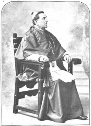 'Francisco Jarrín y Moro, obispo de Plasencia, obra del fotógrafo Venancio Gombau, recogido en la revista española La ilustración española y americana.